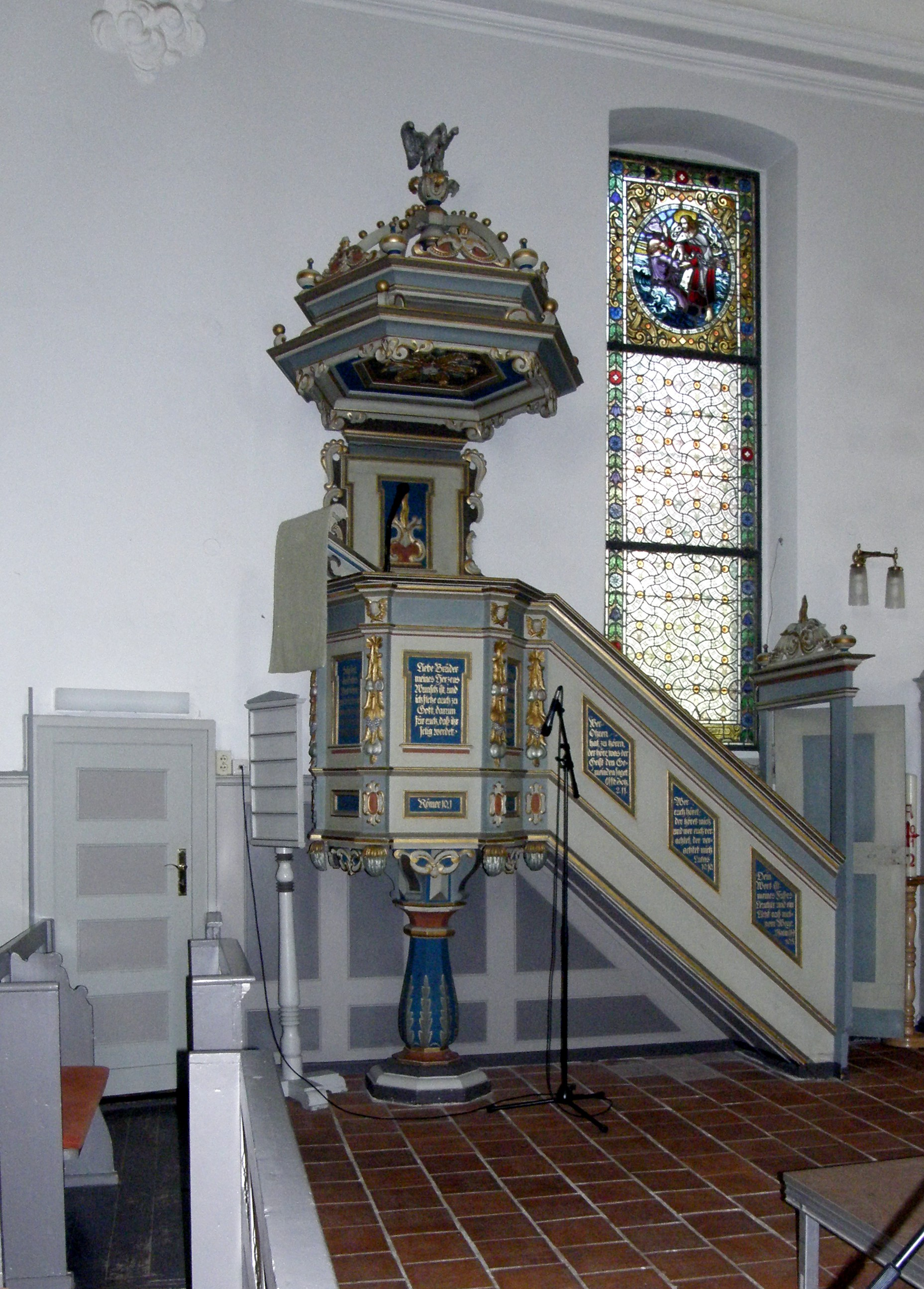 Berlin-Kaulsdorf, Jesuskirche: Kanzel